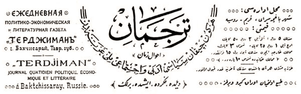 Назва видання «Терджиман»